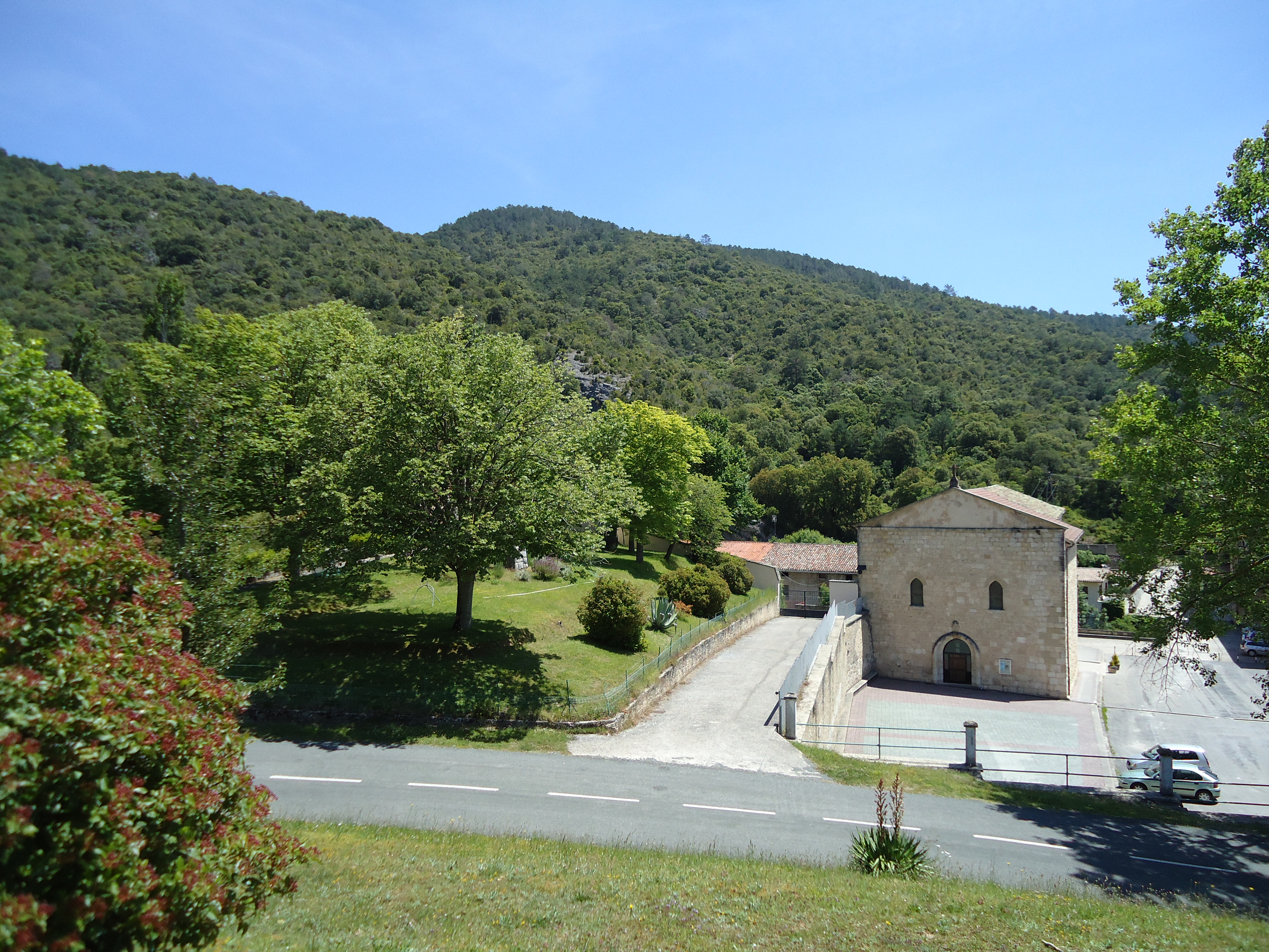 Angostoko santutegia